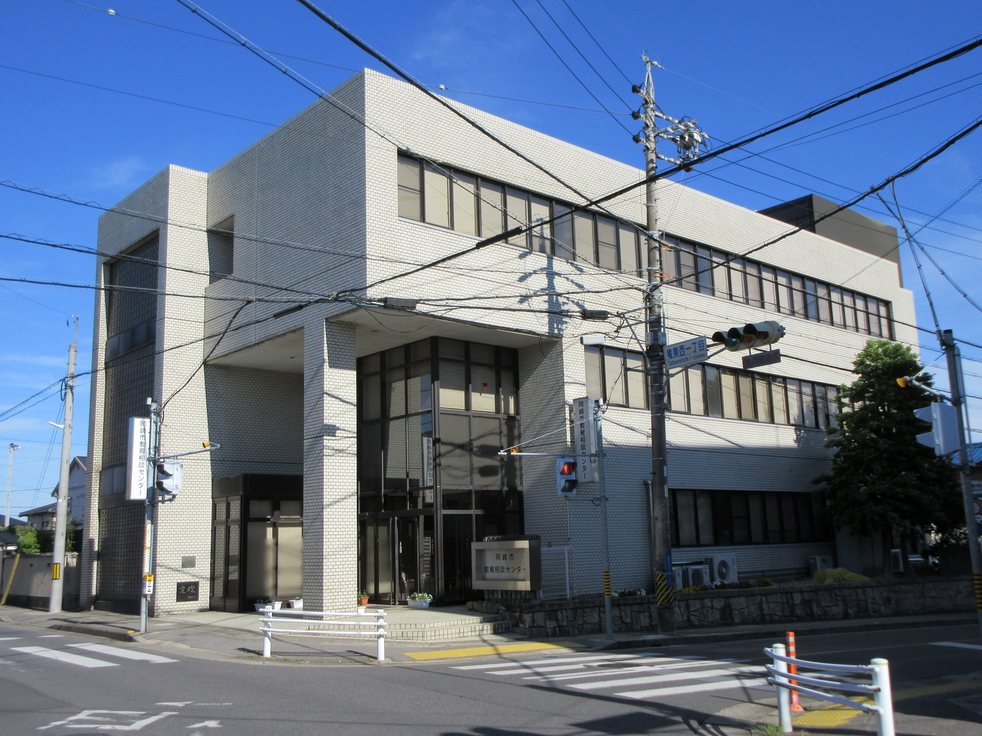 岡崎市教育相談センター（岡崎市竜美北）